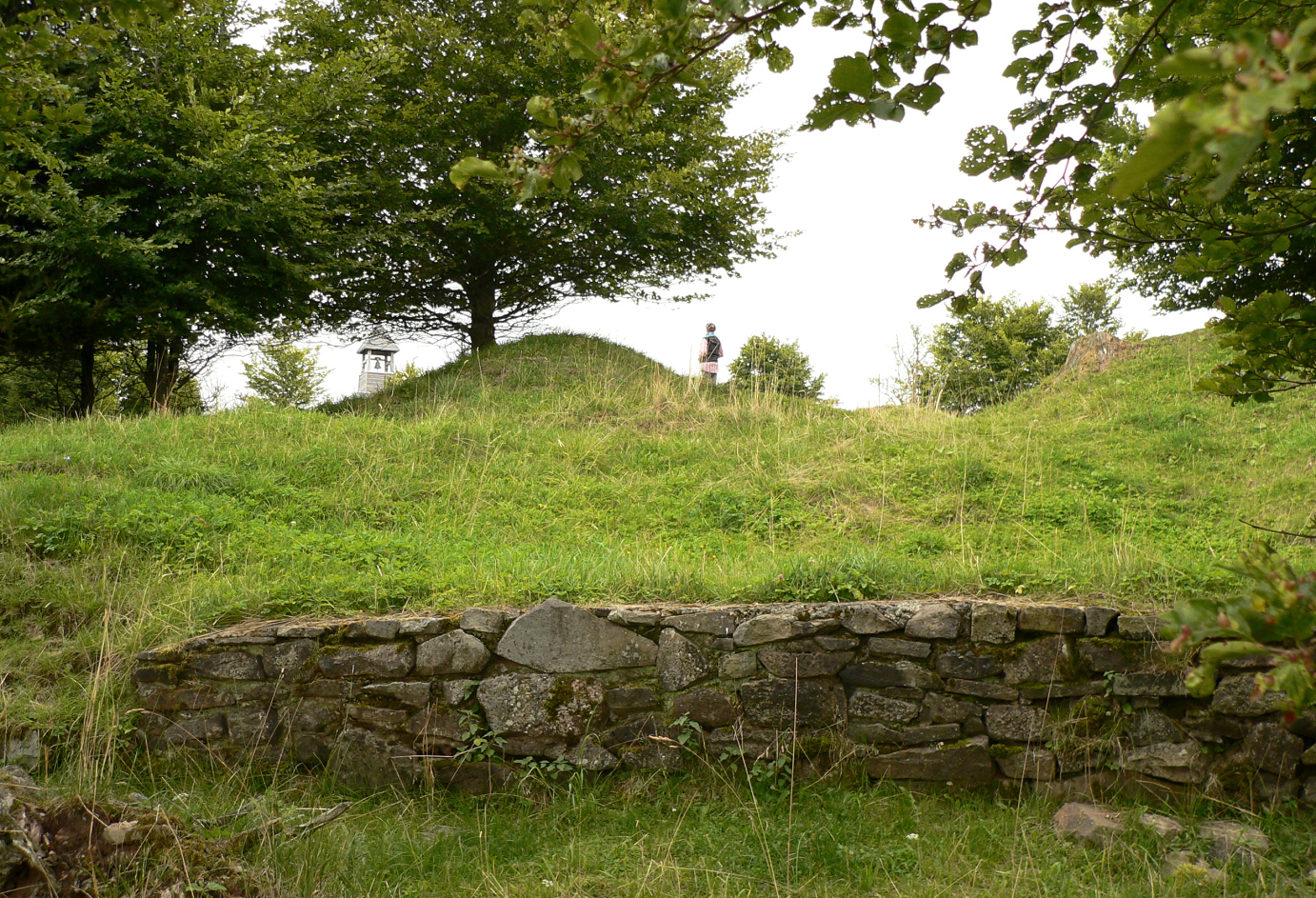 Mauerreste an der Quernstkirche; links im Hintergrund der Turm der Quernstkapelle